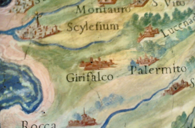 Girifalco nella carta della Calabria Ulteriore nella Galleria delle carte geografiche dei Musei Vaticani (1580-1585).